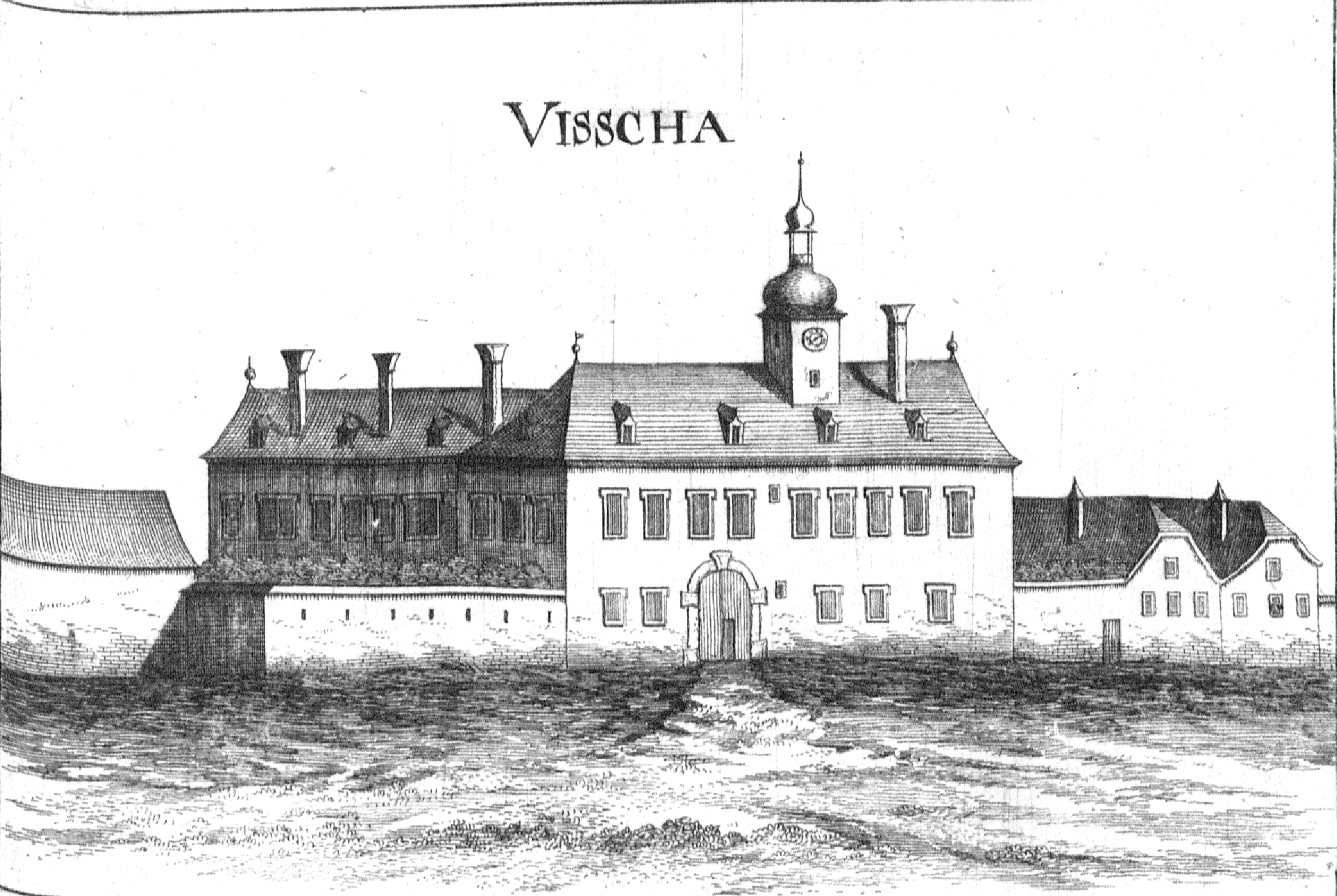 Schloss Fischau (Gemeinde Bad Fischau-Brunn) Niederösterreich, Österreich.